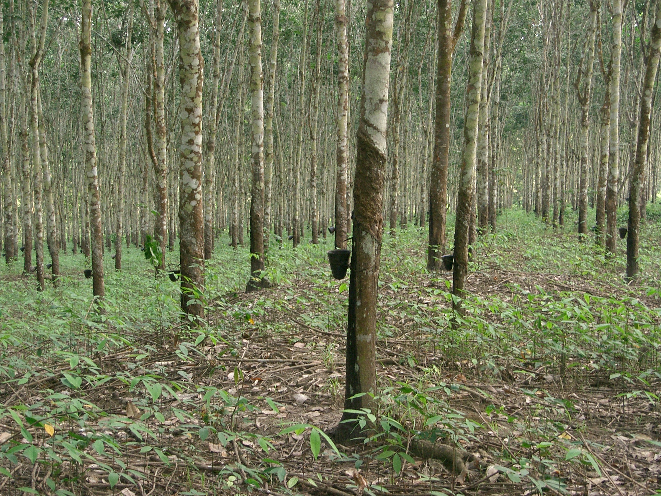 Plantation d'hévéas dans l'ouest du Cameroun avec les gobelets pour la récolte du latex